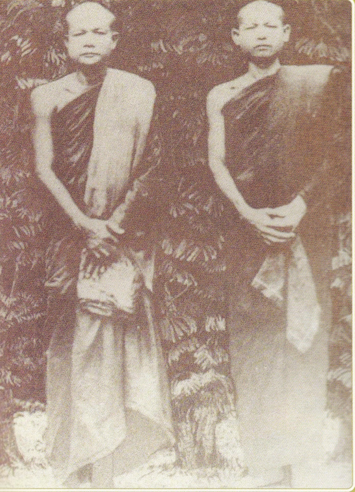 หลวงปู่ดูลย์ อตุโล กับ หลวงปู่สิงห์ ขนฺตยาคโม ณ วัดสุทัศน์ จังหวัดอุบลราชธานี